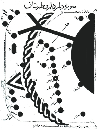 نقشه طبرستان در کتاب الاقلیم اصطخری